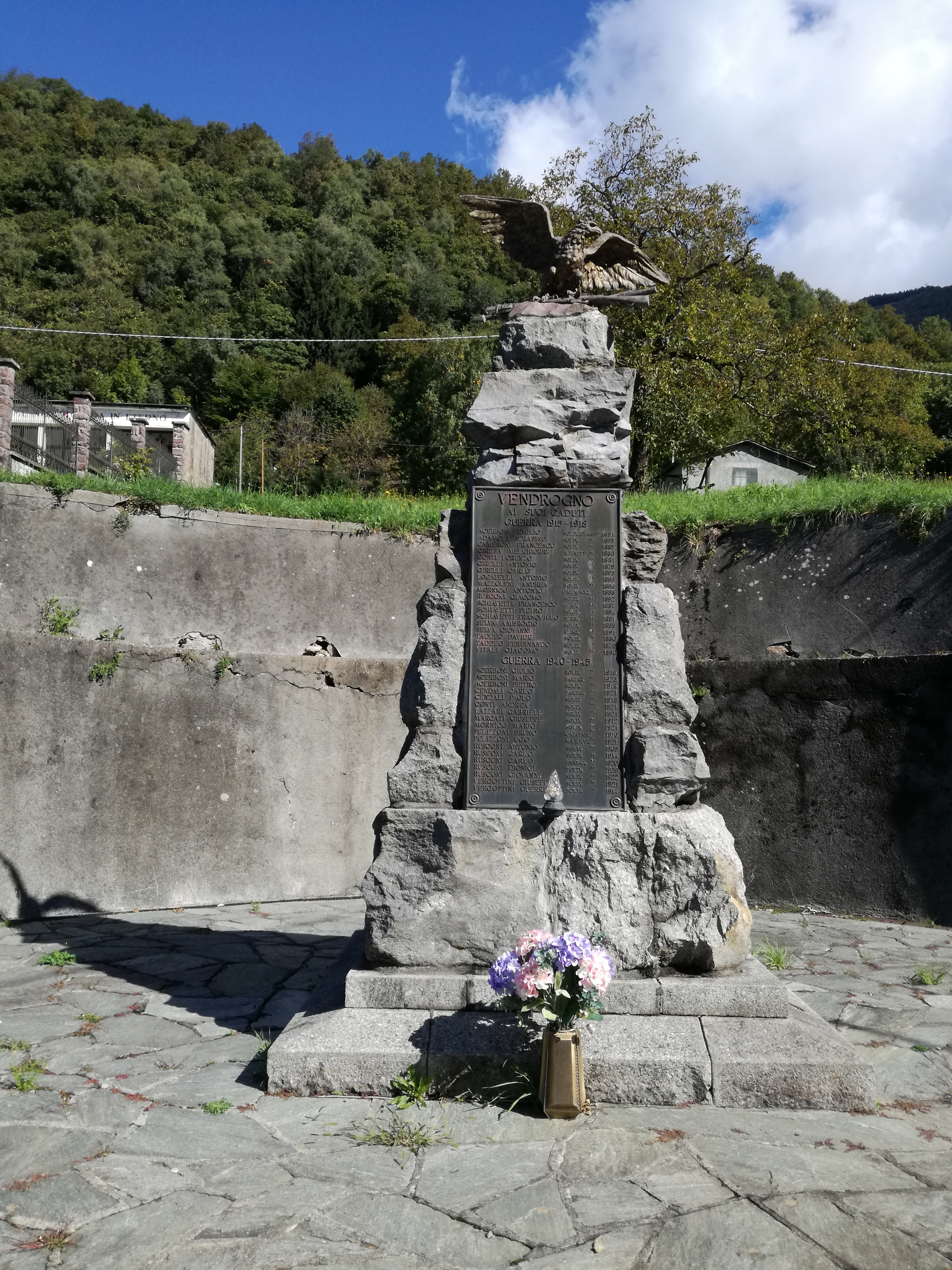 Monumento ai caduti This is a photo of a monument which is part of cultural heritage of Italy.